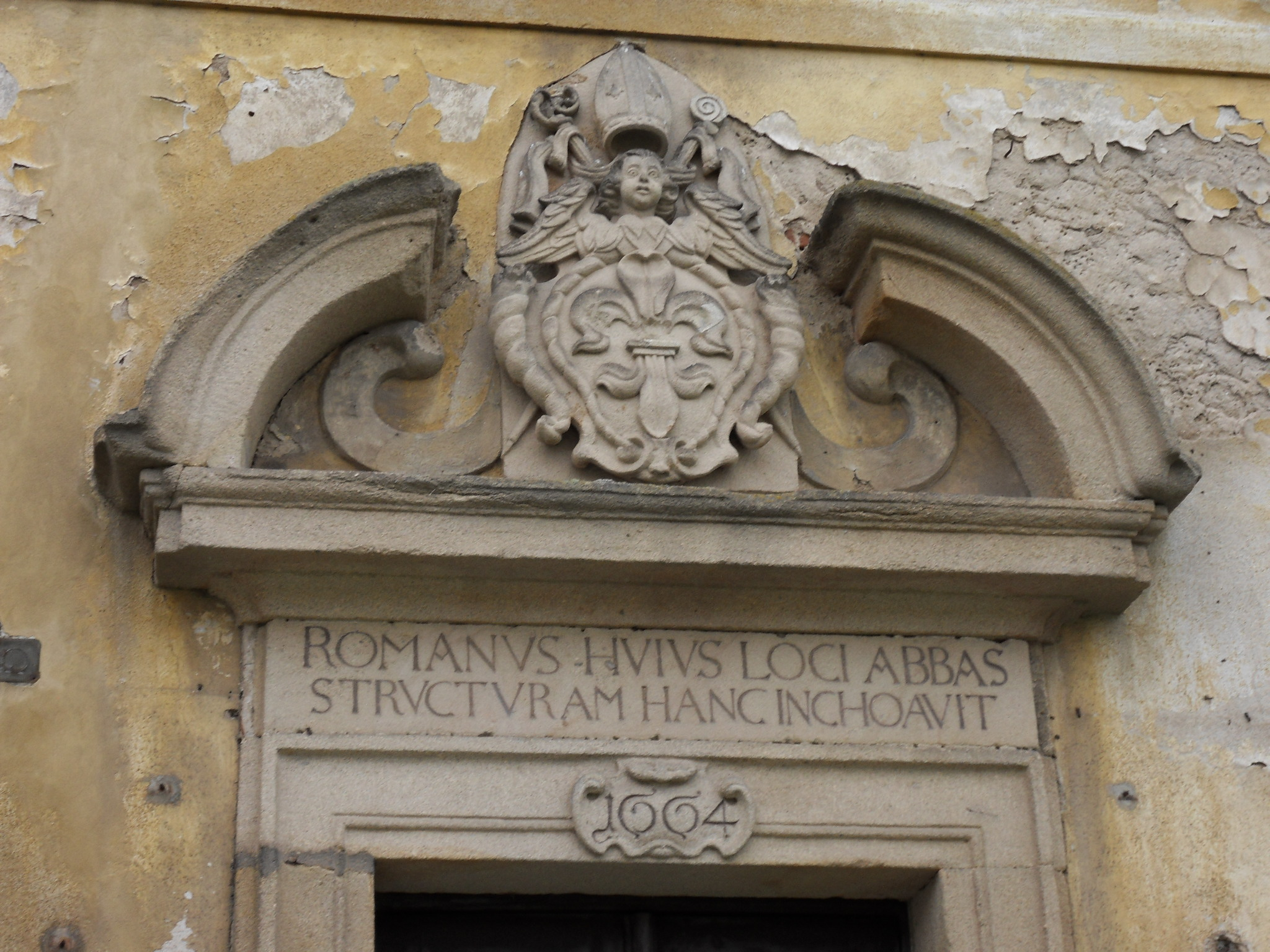 Znak nad vchodem do staré prelatury. Klášter benediktýnů s kostelem Nanebevzetí Panny Marie, Kladruby 1, Kladruby (okres Tachov).